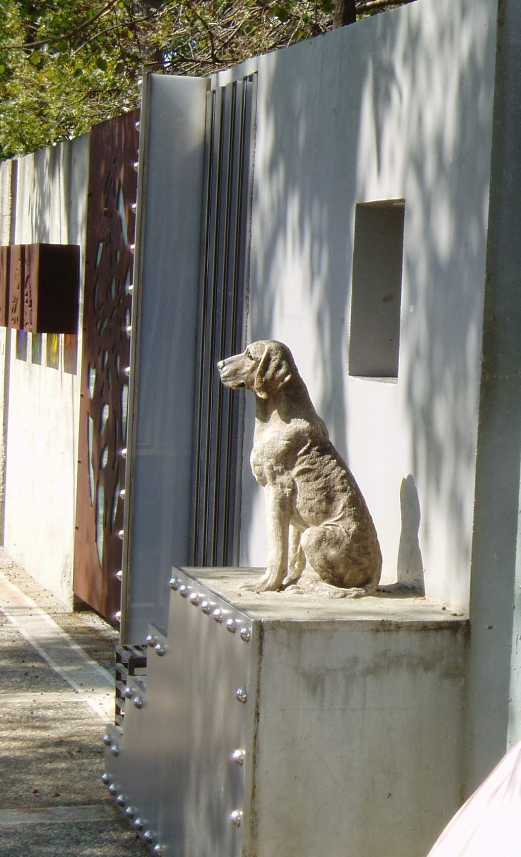 Urban Spotlight -- Dog